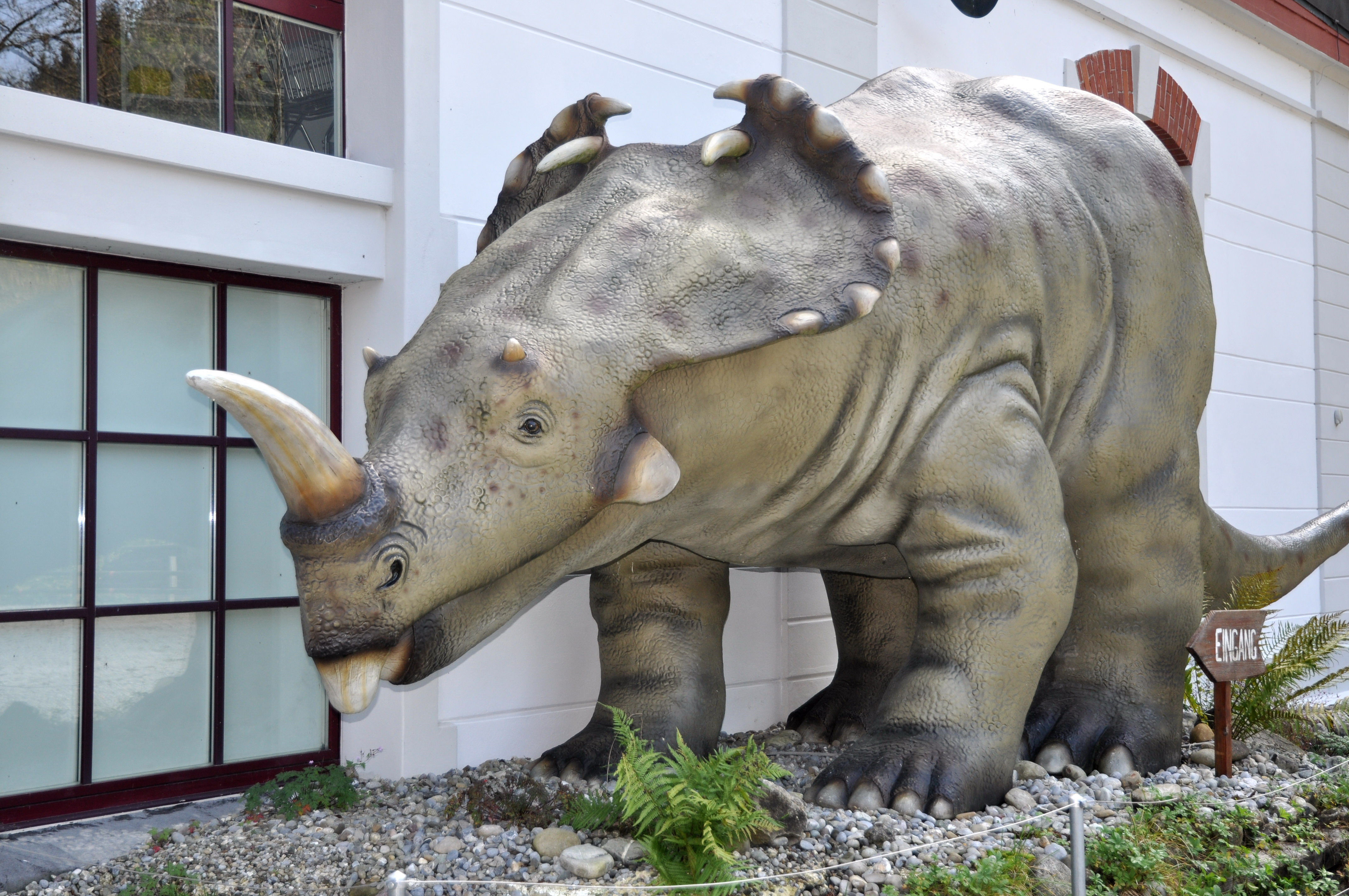 Sauriermuseum Aathal, Zürichstrasse / Unter Aathal 202 in Aathal-Seegräben (Switzerland)